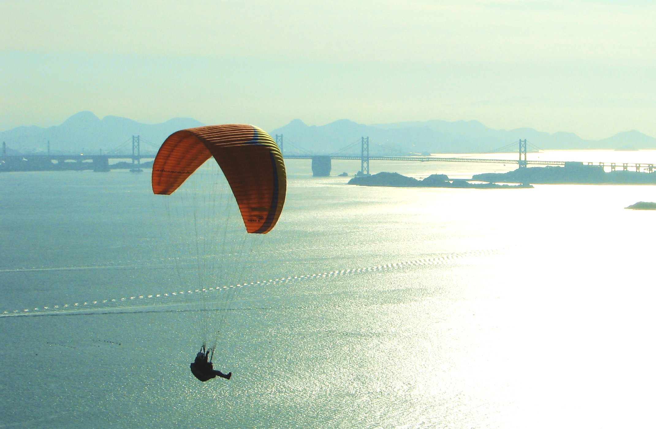 玉野市 王子が岳より 瀬戸大橋 ❀ 春霞む 瀬戸大橋の 風うけて （小原善郎）